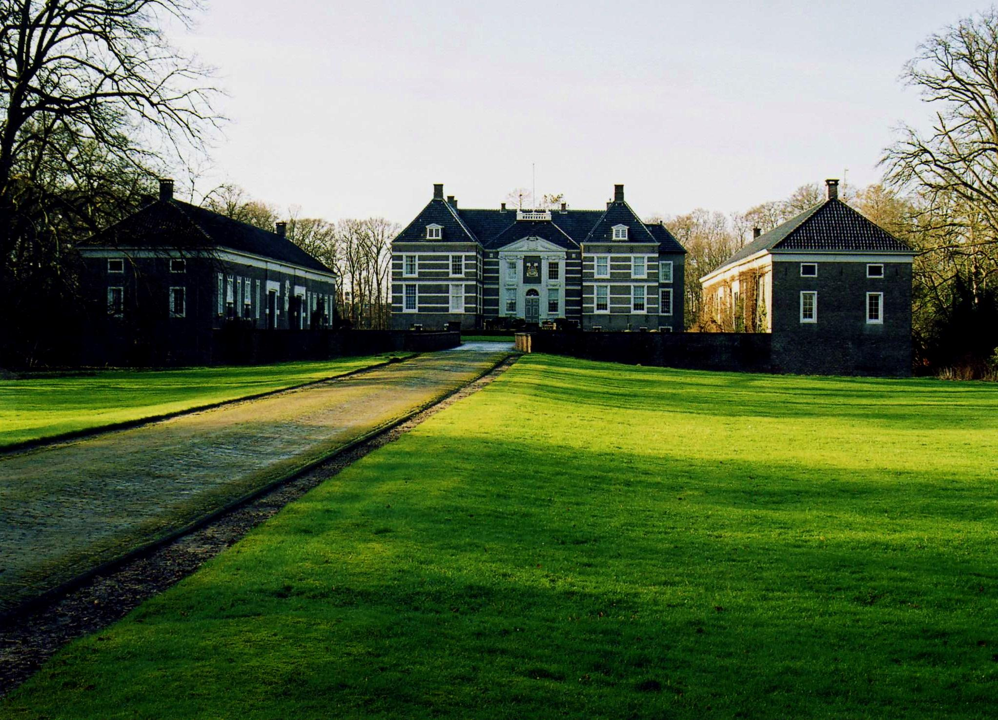 Huize Almelo met bouwhuizen.